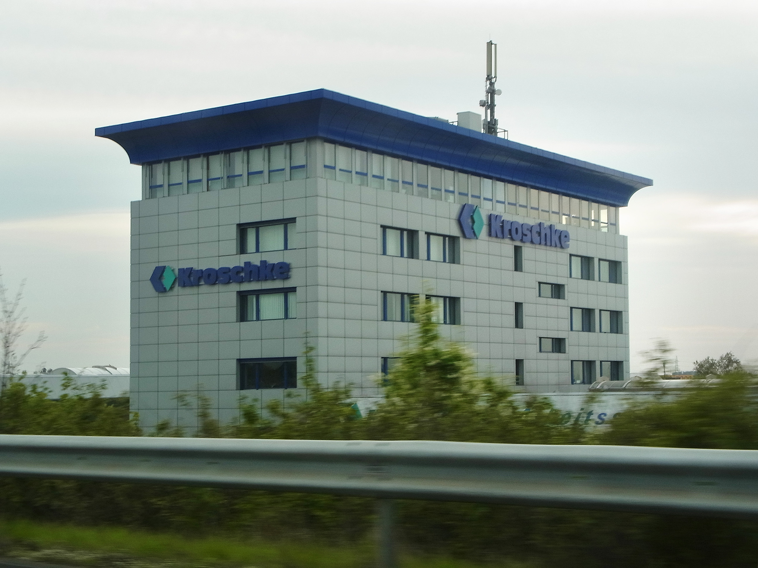 Firmengebäude der Kroschke Unternehmensgruppe in Braunschweig